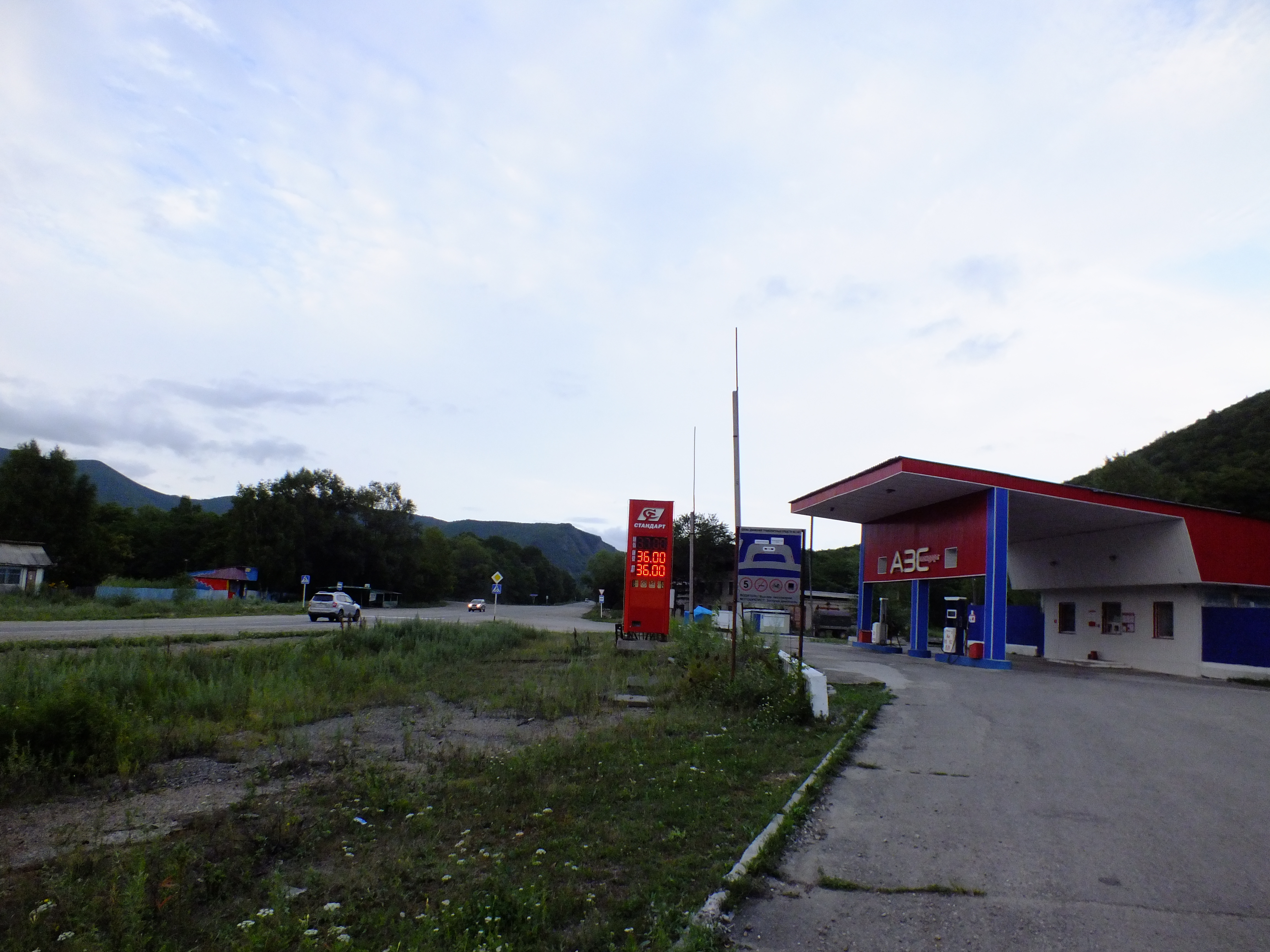 Село Антоновка Чугуевский район Приморский край